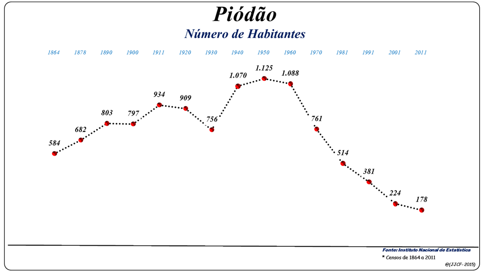 População